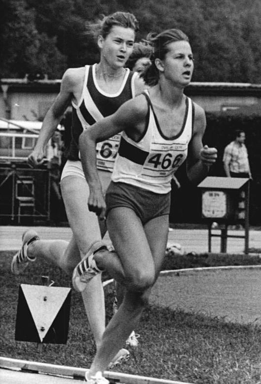 Birte Bruhns ADN-ZB Roeske 30.7.88 Kanada: 2. Junioren-WM der Leichtathleten in Sudbury- Birte Bruhns vom SC Empor Rostock wurde am 29.7.88 Weltmeisterin über die 800-m-Distanz in 2:00,67 min. - Foto vom Berliner Wettkampf am 20.7.